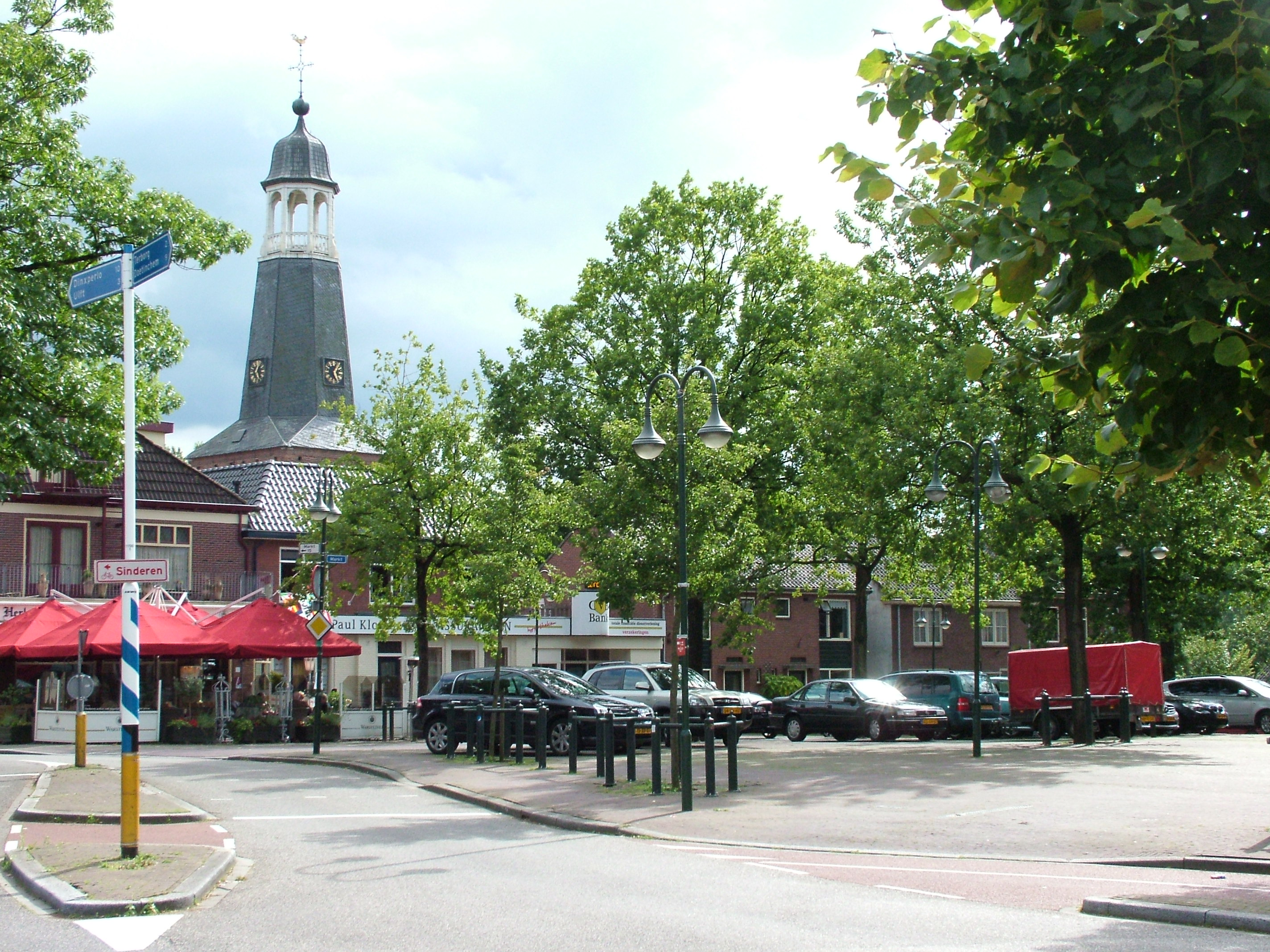 Markt van Silvolde (Oude Ijsselstreek), links de toren van de Oude St. Mauritius kerk (hervormd)